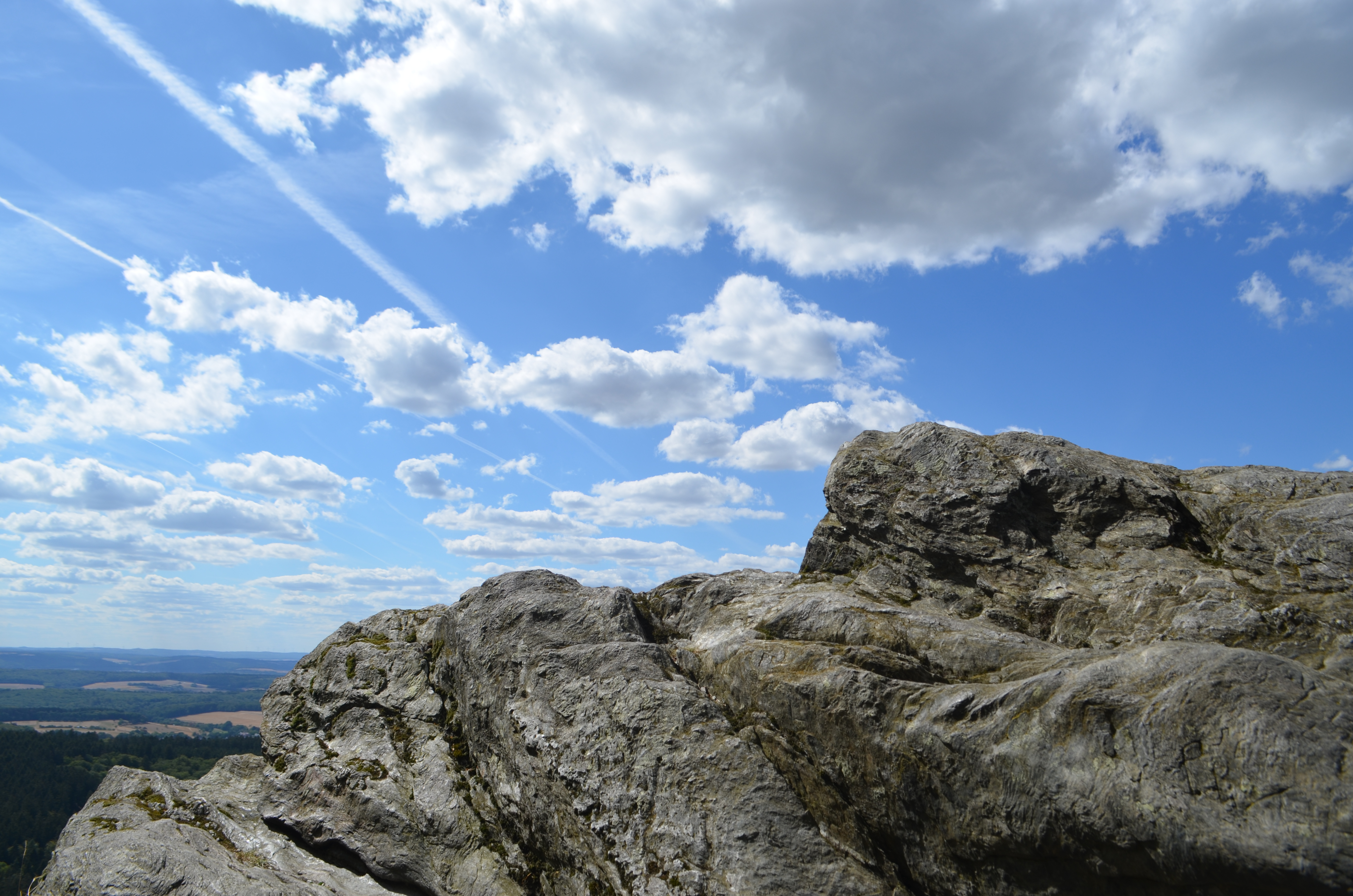 Zacken (Taunus)